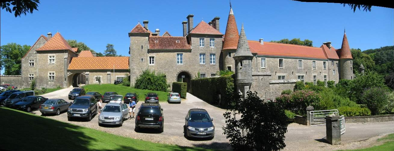 Chateau de Bournel - Franche Comté